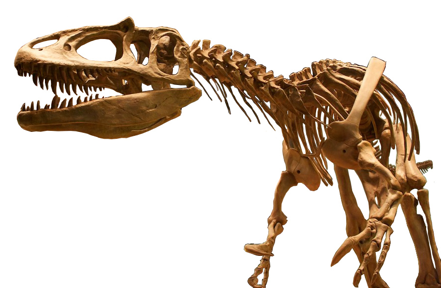 Saurophaganax